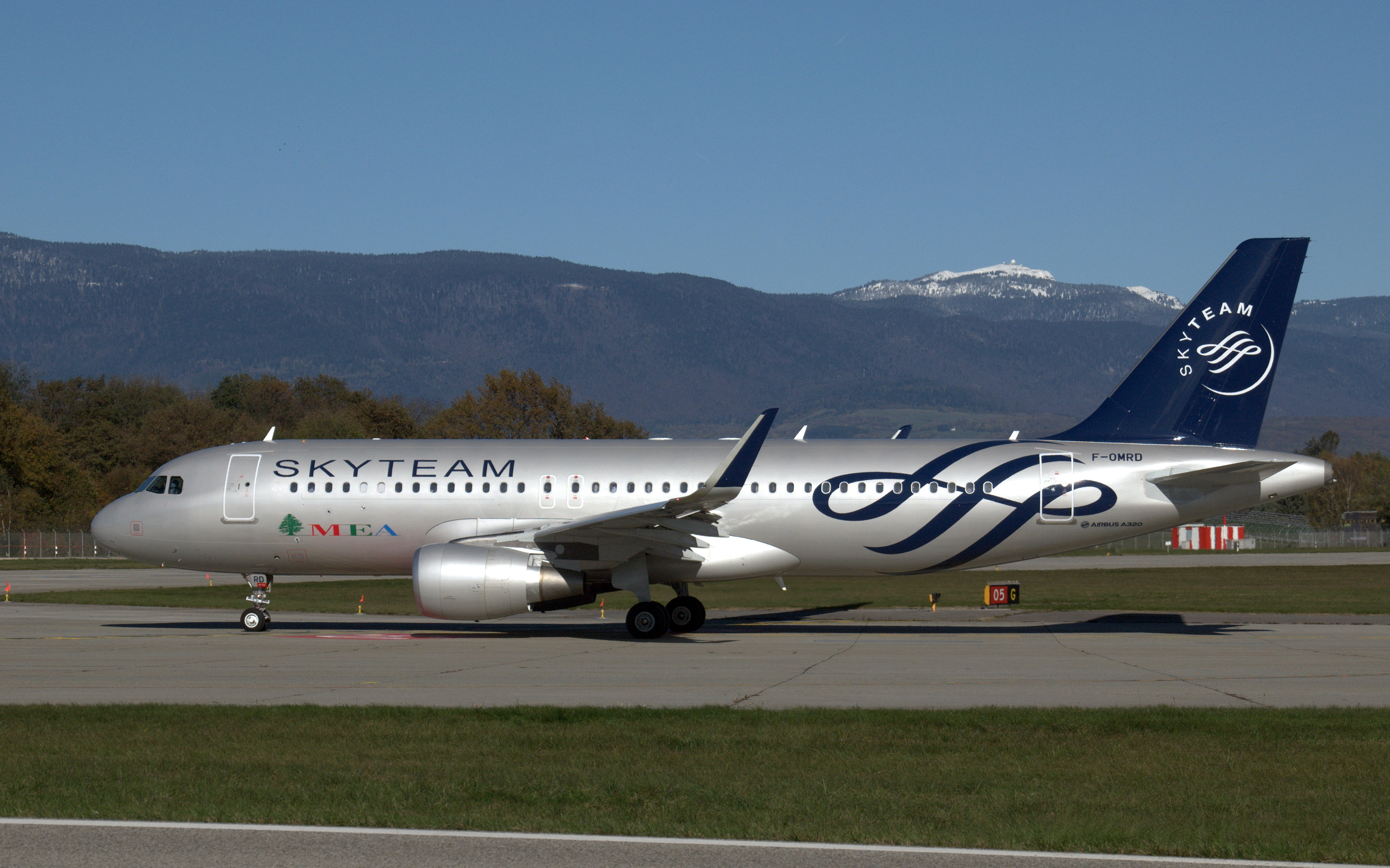 GVA 11.11.2013